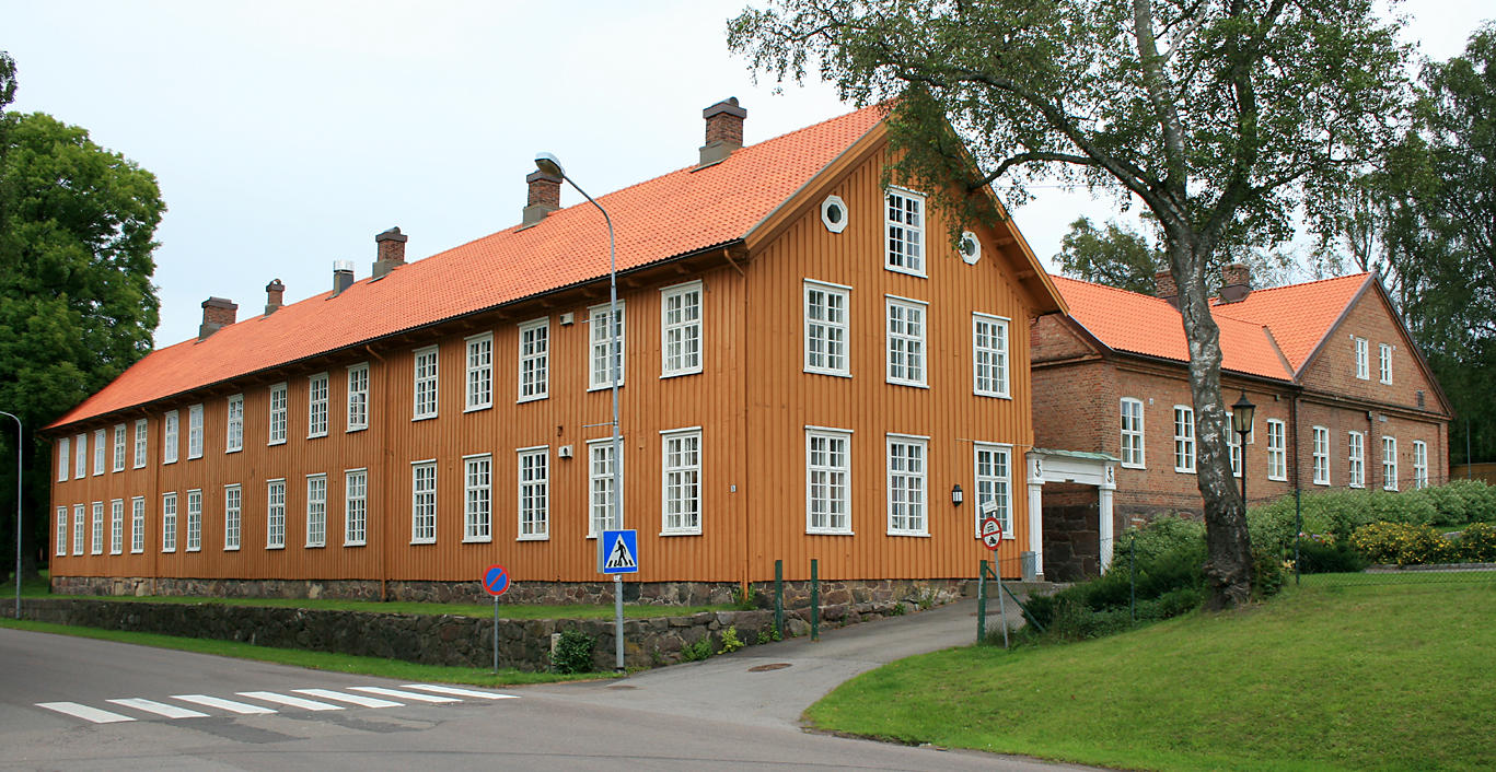 Sjømilitære korps' kaserne, Karljohansvern, Horten.